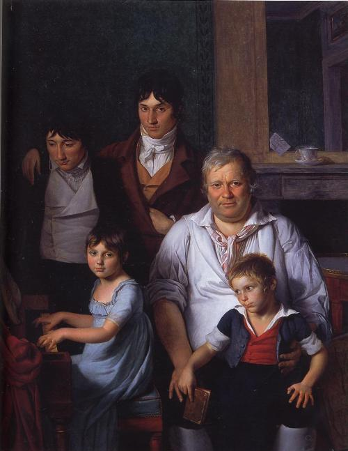 Le conventionnel Michel Gérard et sa famille, Musée de Tessé, Le Mans.